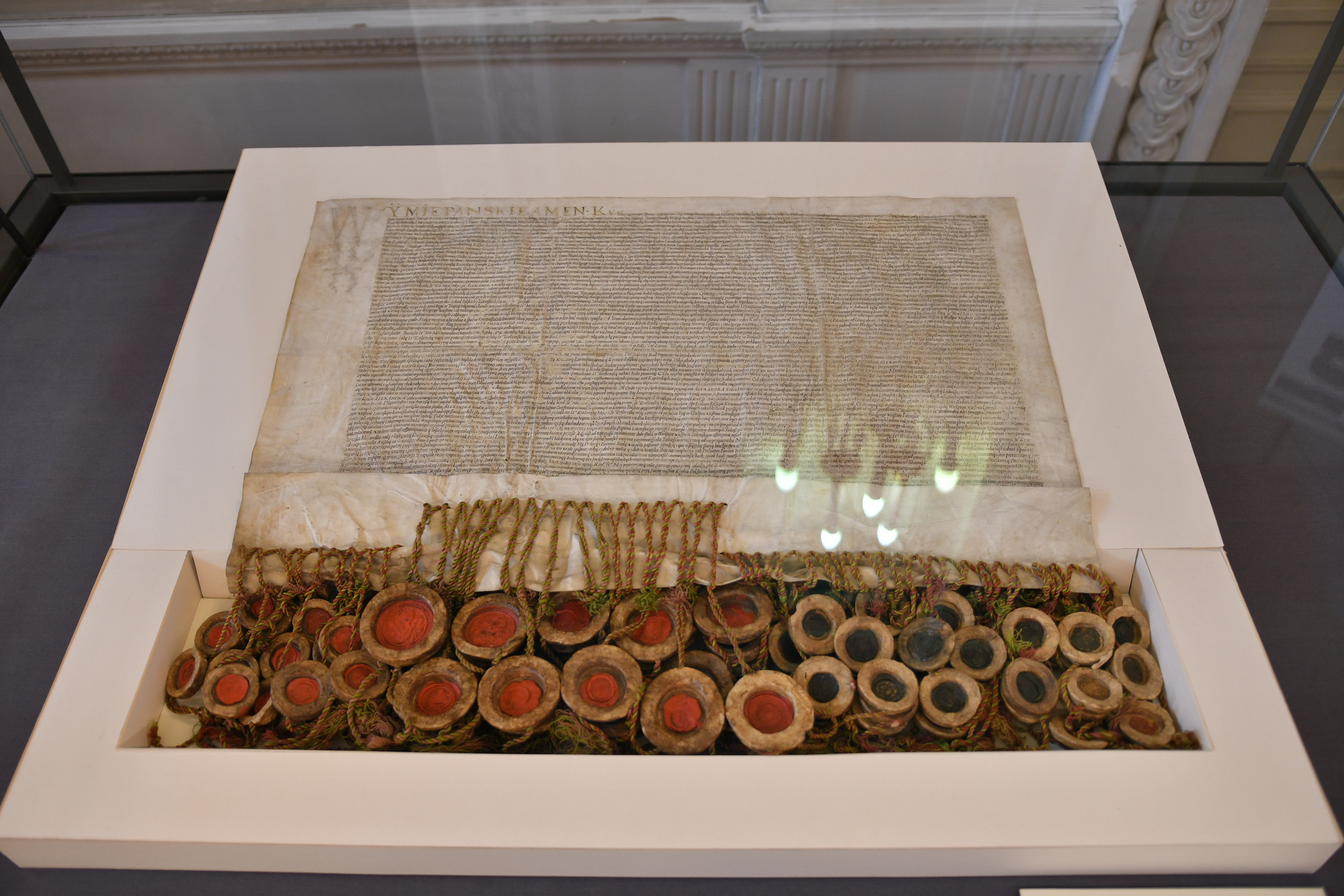 Oryginał aktu Unii Lubelskiej w siedzibie Archiwum Głównego Akt Dawnych.